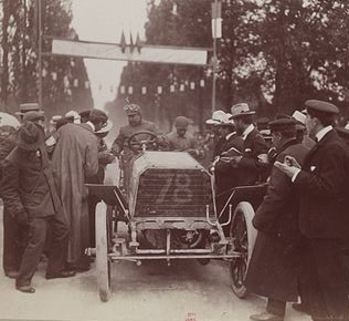 [Collection Jules Beau. Photographie sportive] : T. 21. Année 1903 / Jules Beau